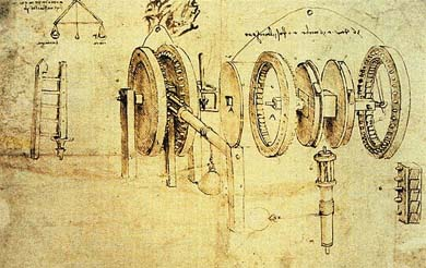 рисунок Леонардо да Винчи - Трансформация переменного движения в непрерывное